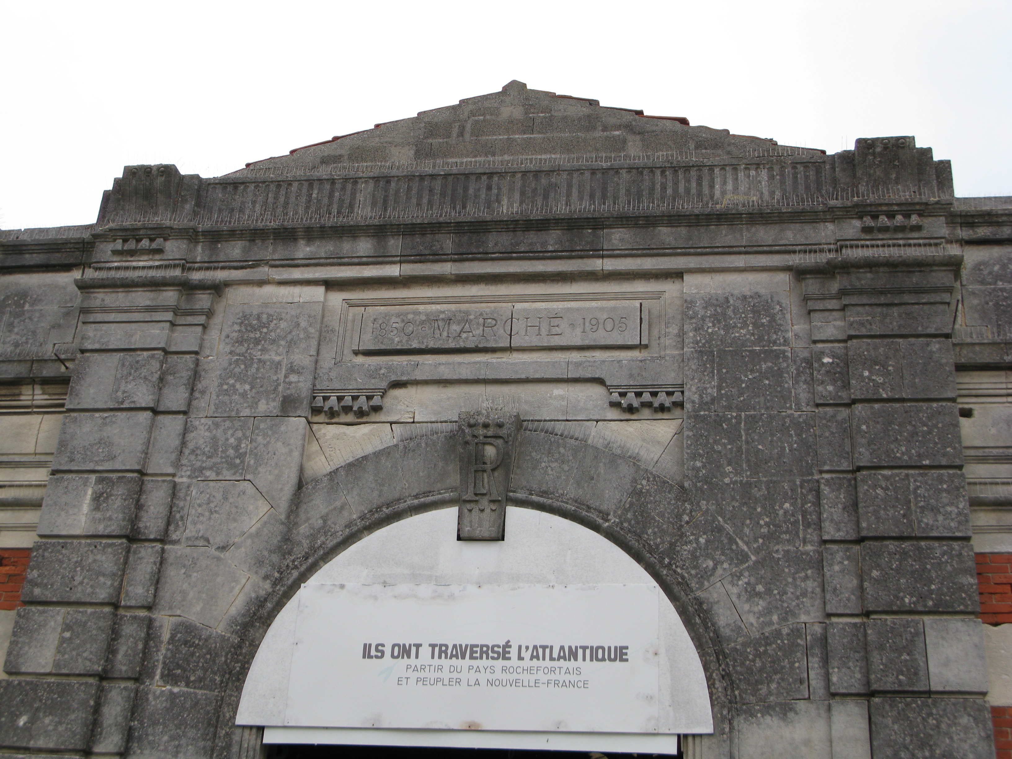 Fronton des halles de Tonnay-Charente